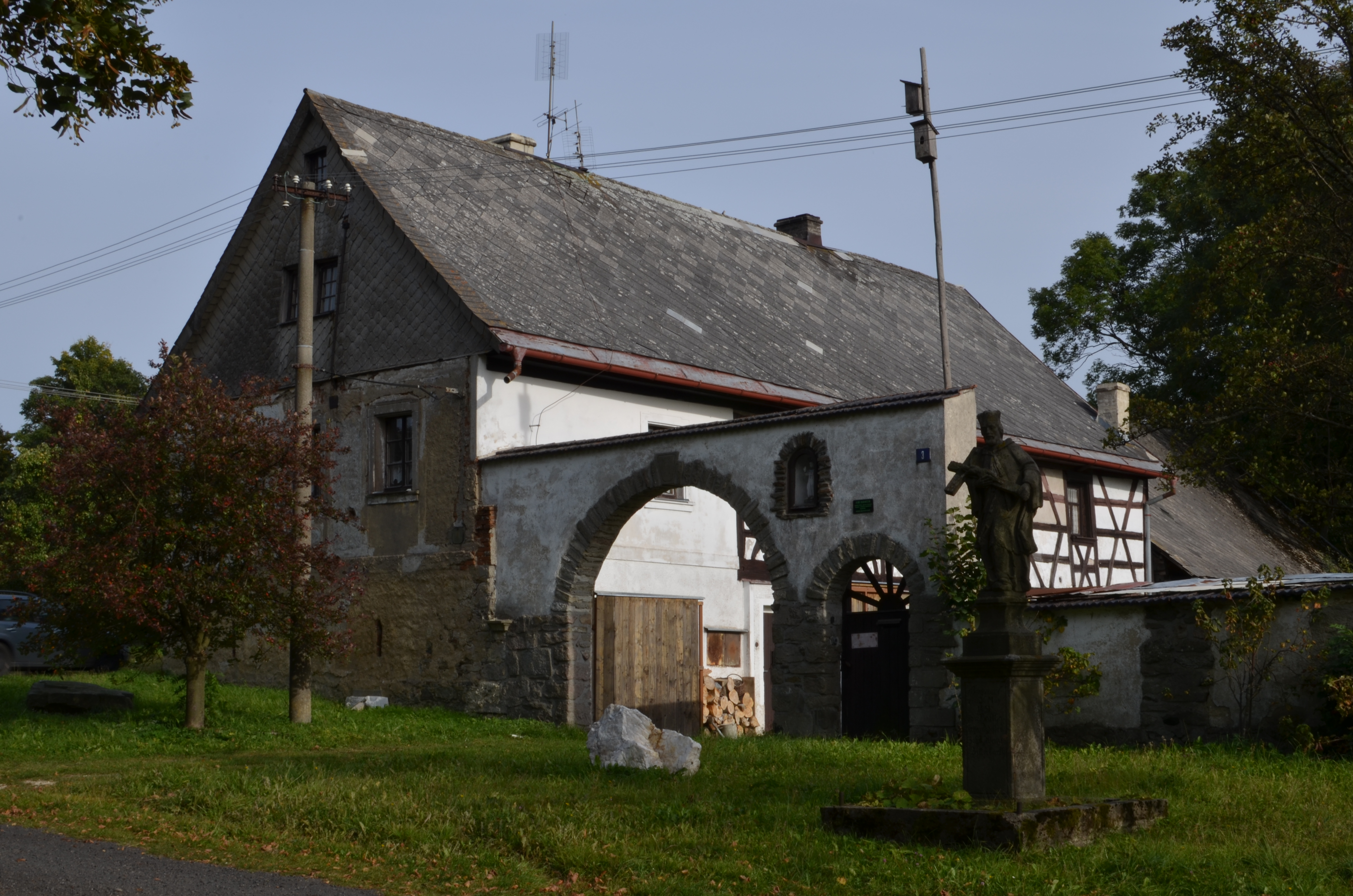 Sítiny_Raušenbach_Svurvody_-_čp3